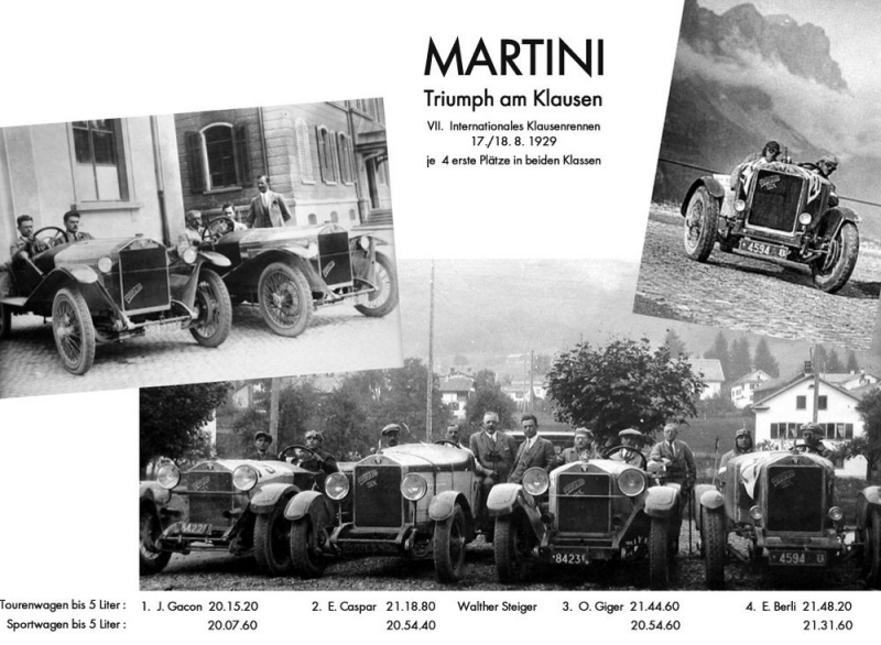 Martini Vierfachsieg beim Klausenrennen 1929